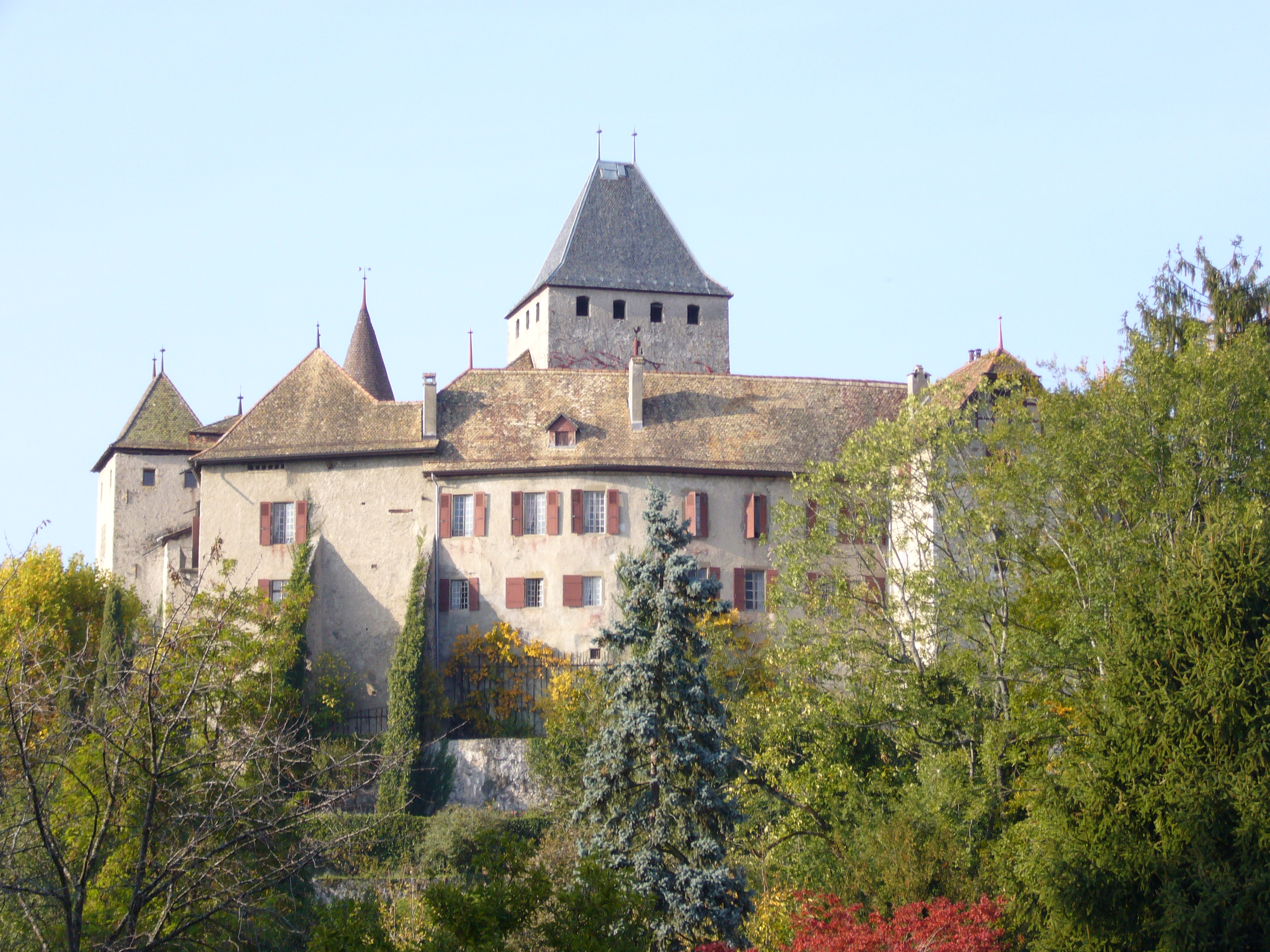 Schloss Blonay, Kanton Waadt